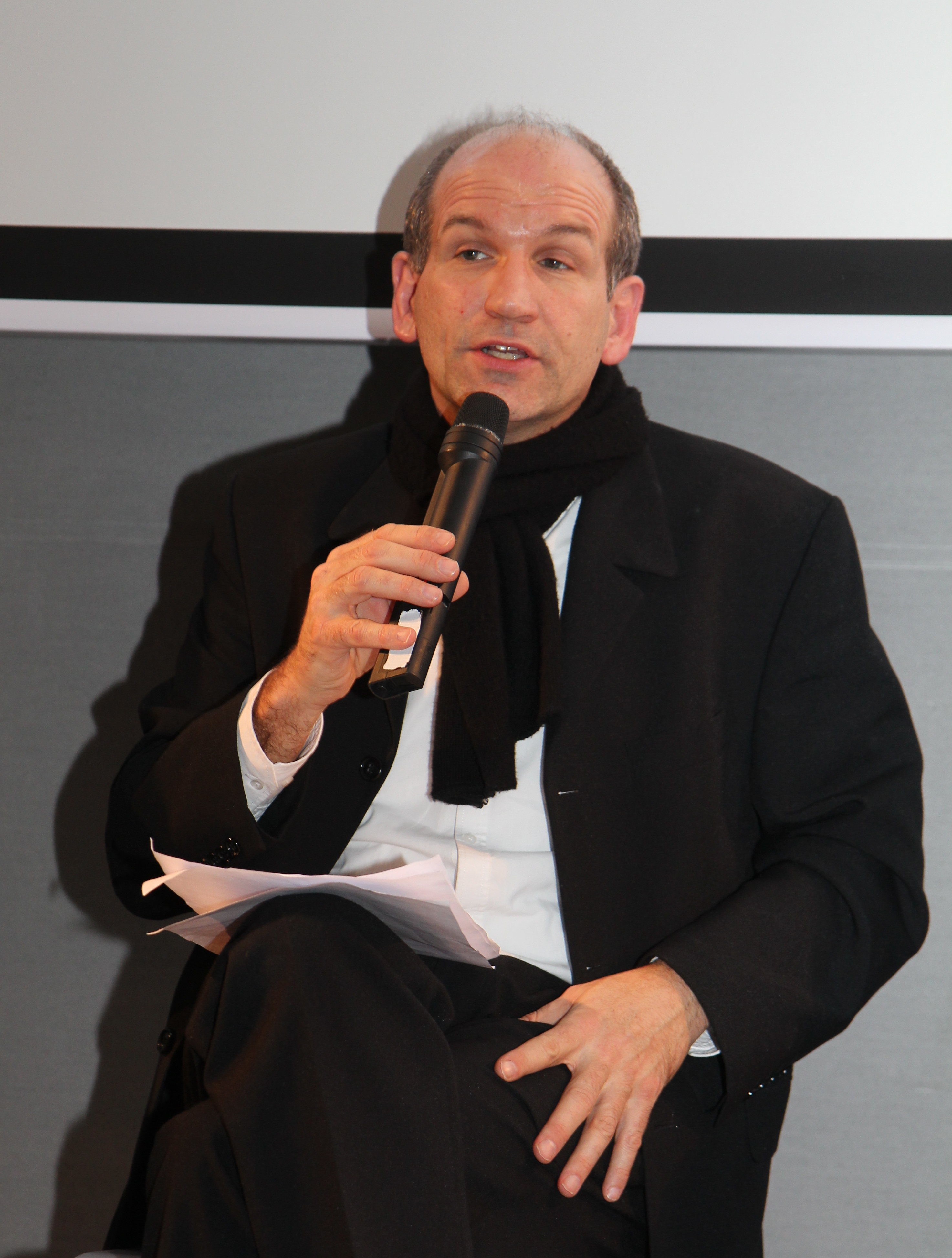 Buchpräsentation "Die deutsche Frage. Olympische Kontroversen in den 1960er Jahren im Deutschen Sport- und Olympiamuseum - Jürgen Mittag